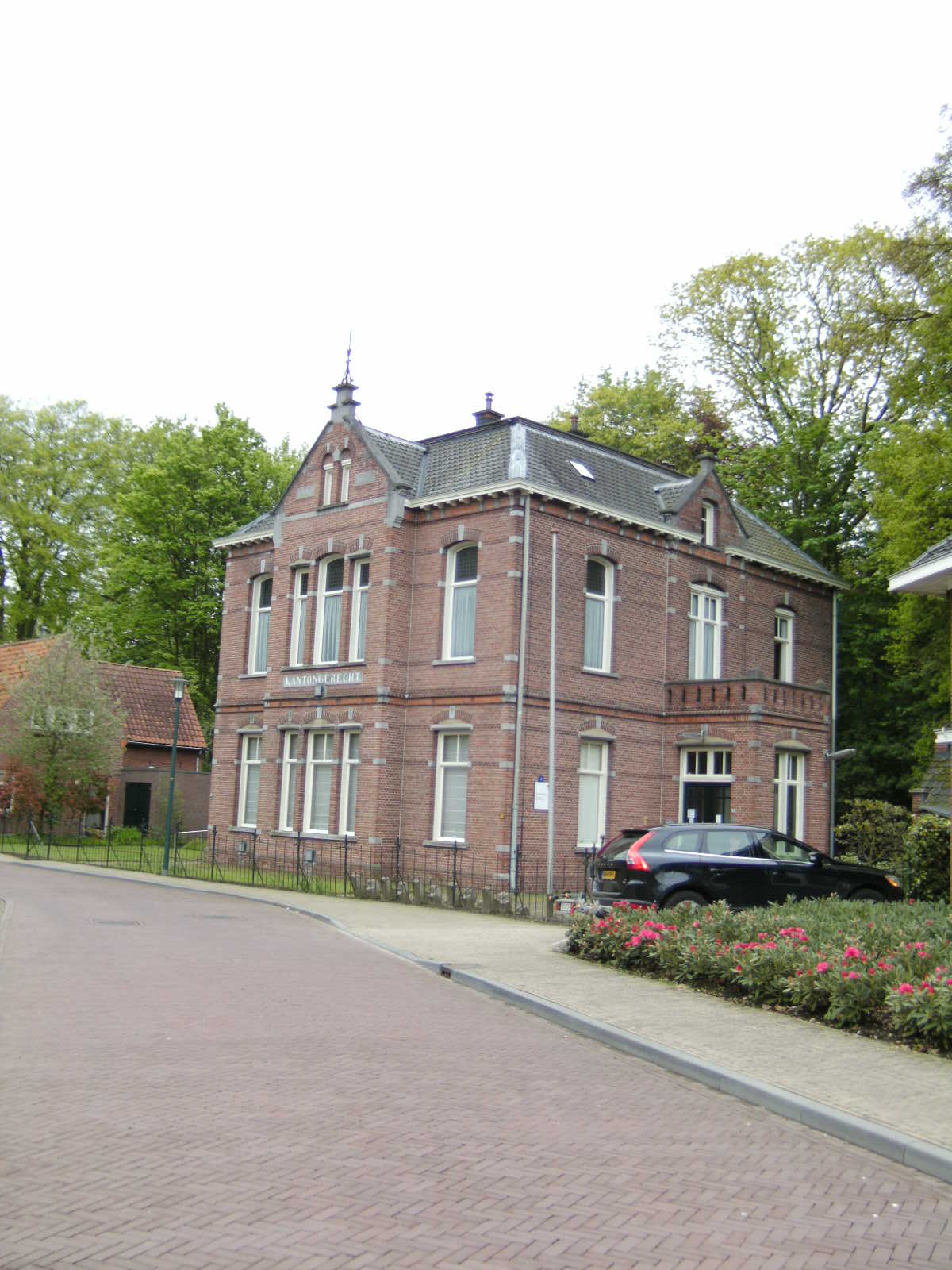 Groenlo, Nederland (The Netherlands). Rijksmonument